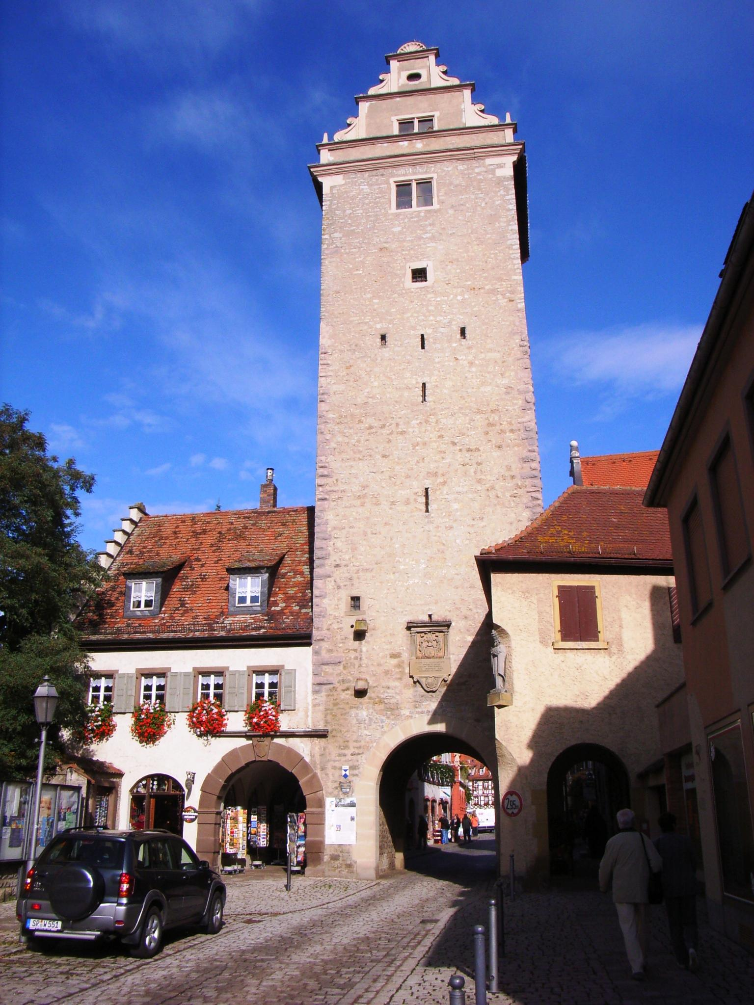 Tor in Volkach